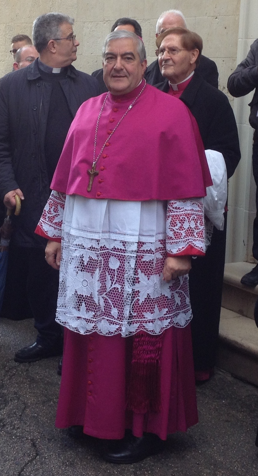 Arcivescovo Michele Seccia